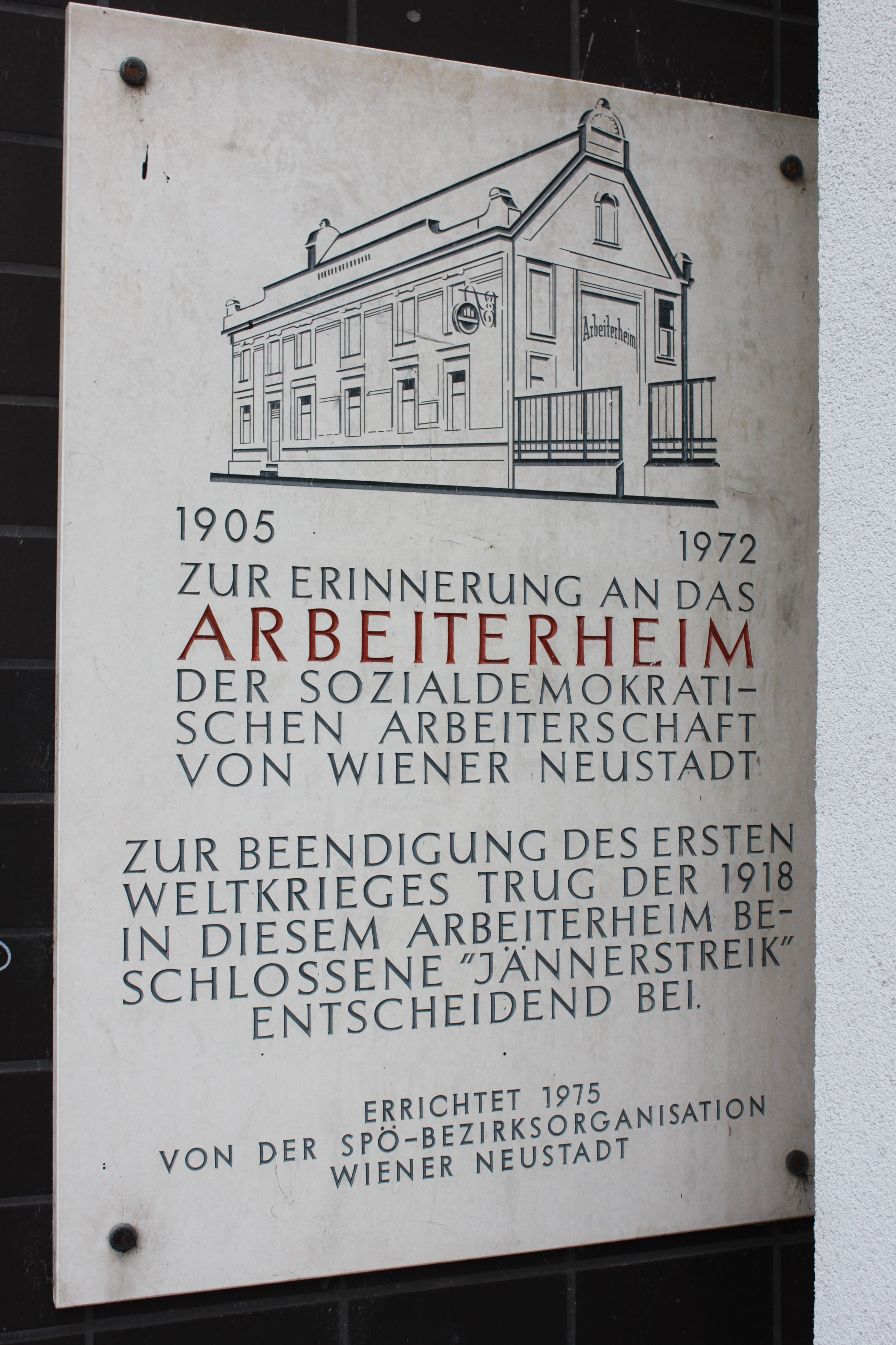 Der Jännerstreik in Wiener Neustadt am 14.01.1918 in den Austro-Daimler Werken wurde im Arbeiterheim beschlossen. Die Gedenktafel ist seitlich am Domcenter Baumkirchnerring 6 angebracht.